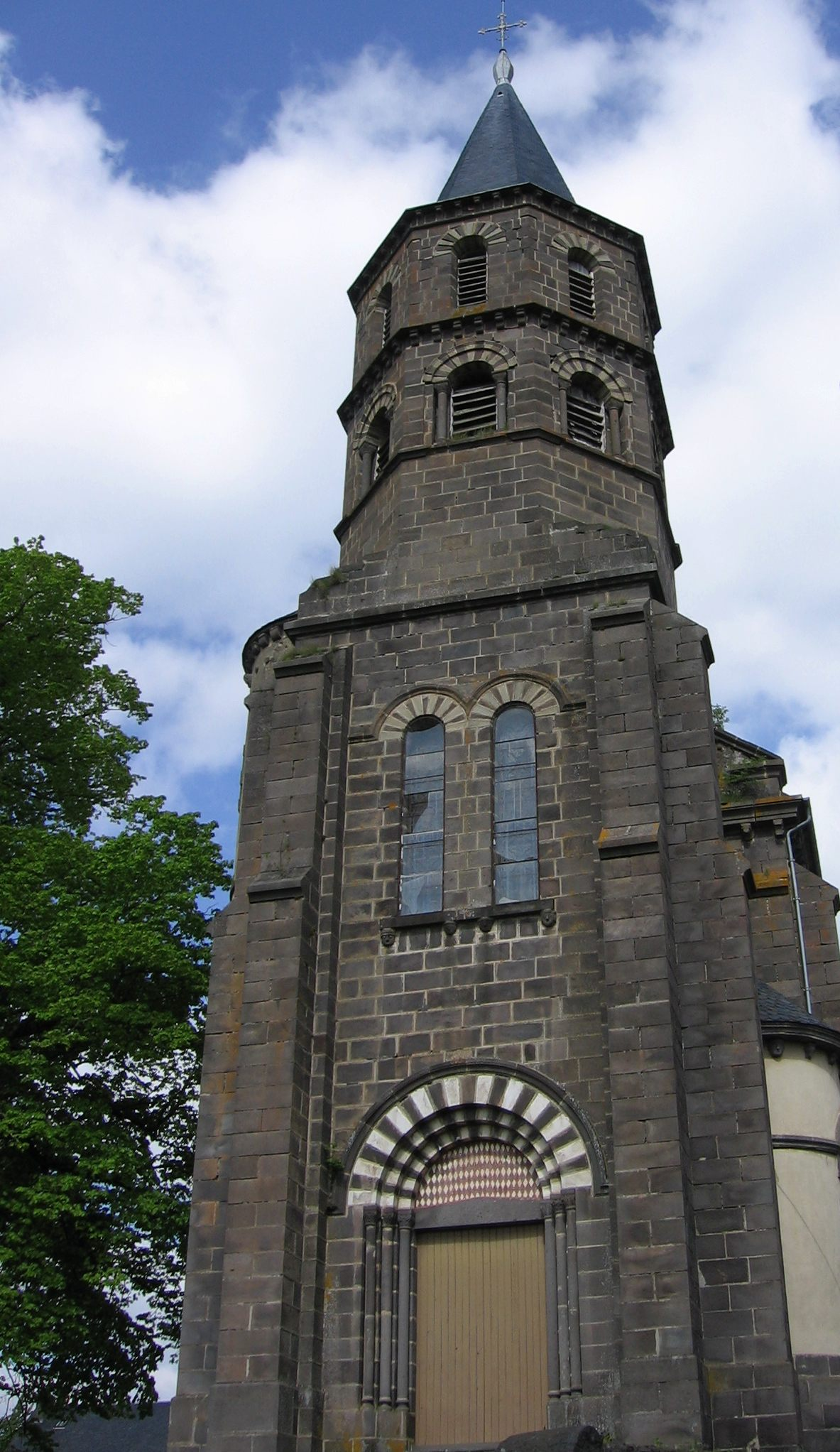 Église romane d'Olby, Puy-de-Dôme, France